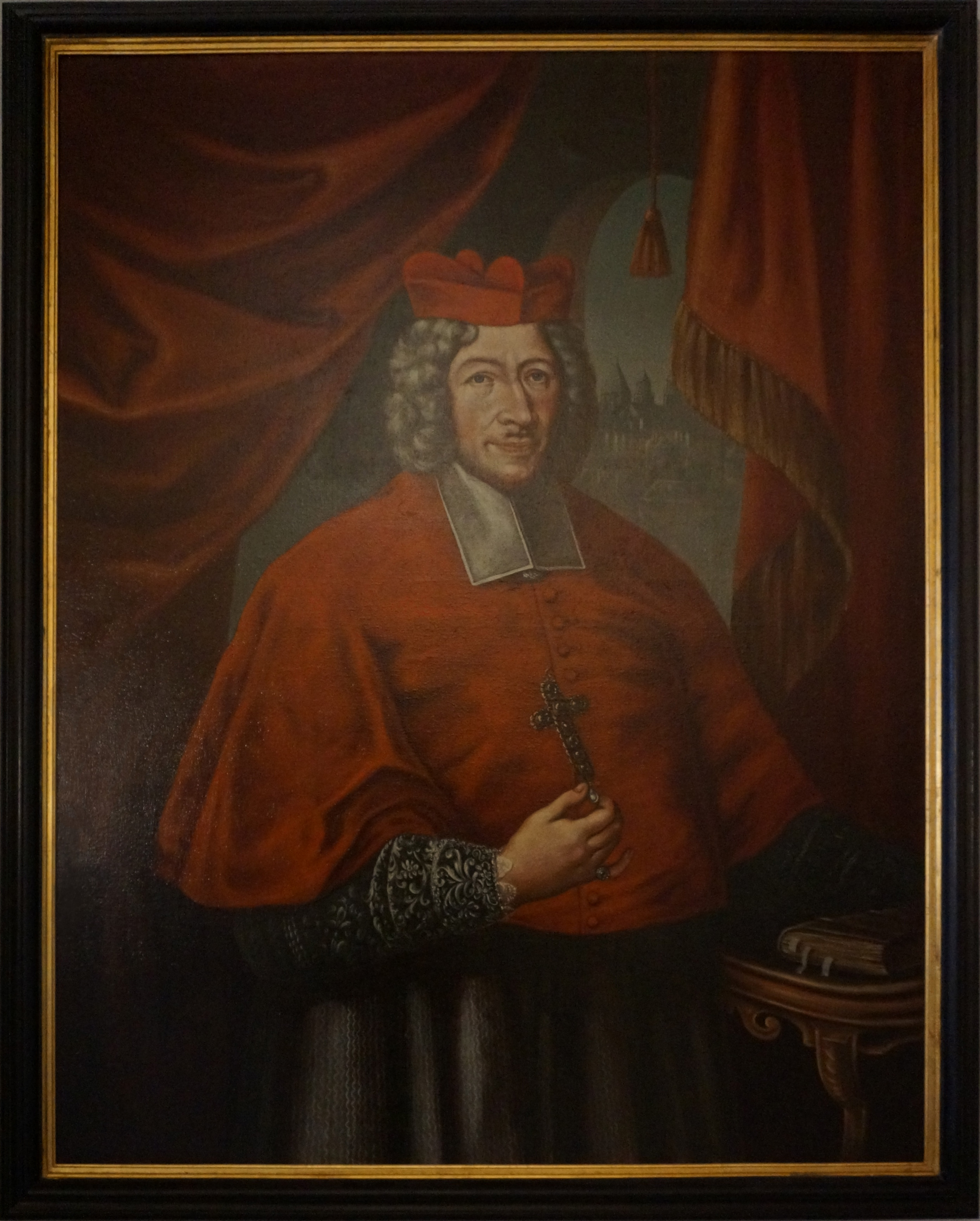 Présenté au musée diocésain.